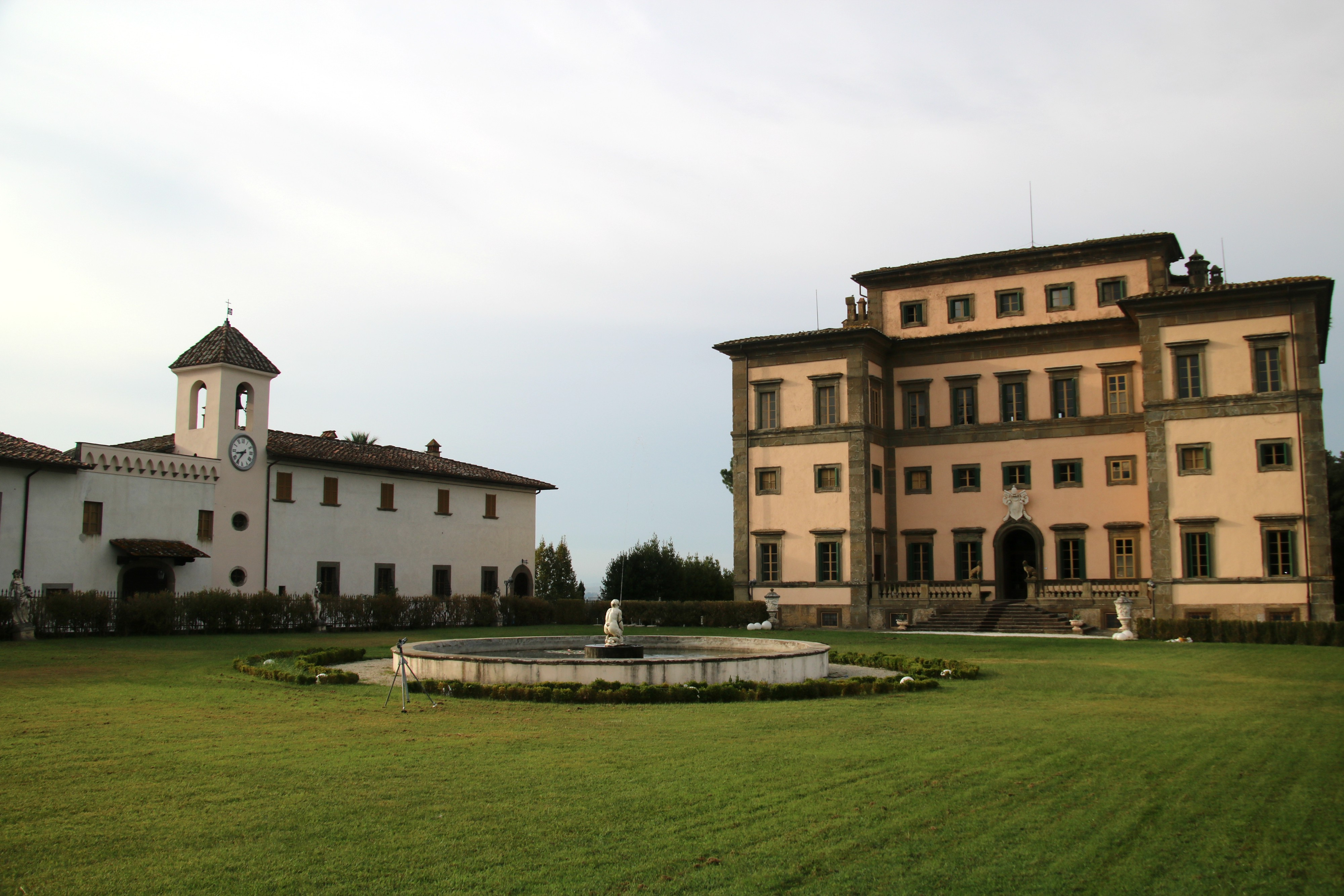 Villa Rospigliosi This is a photo of a monument which is part of cultural heritage of Italy.